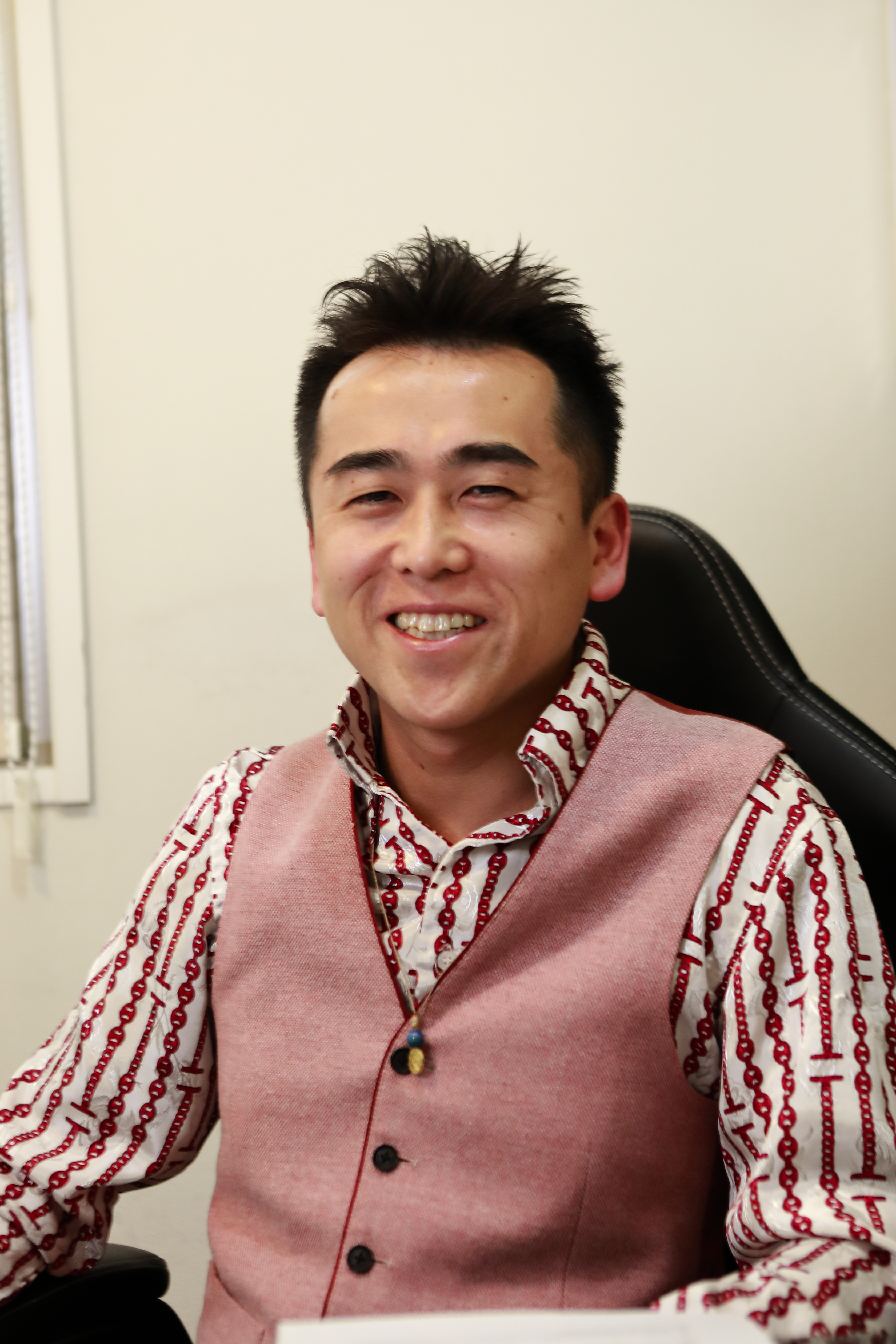 2020年4月、川崎市（神奈川）